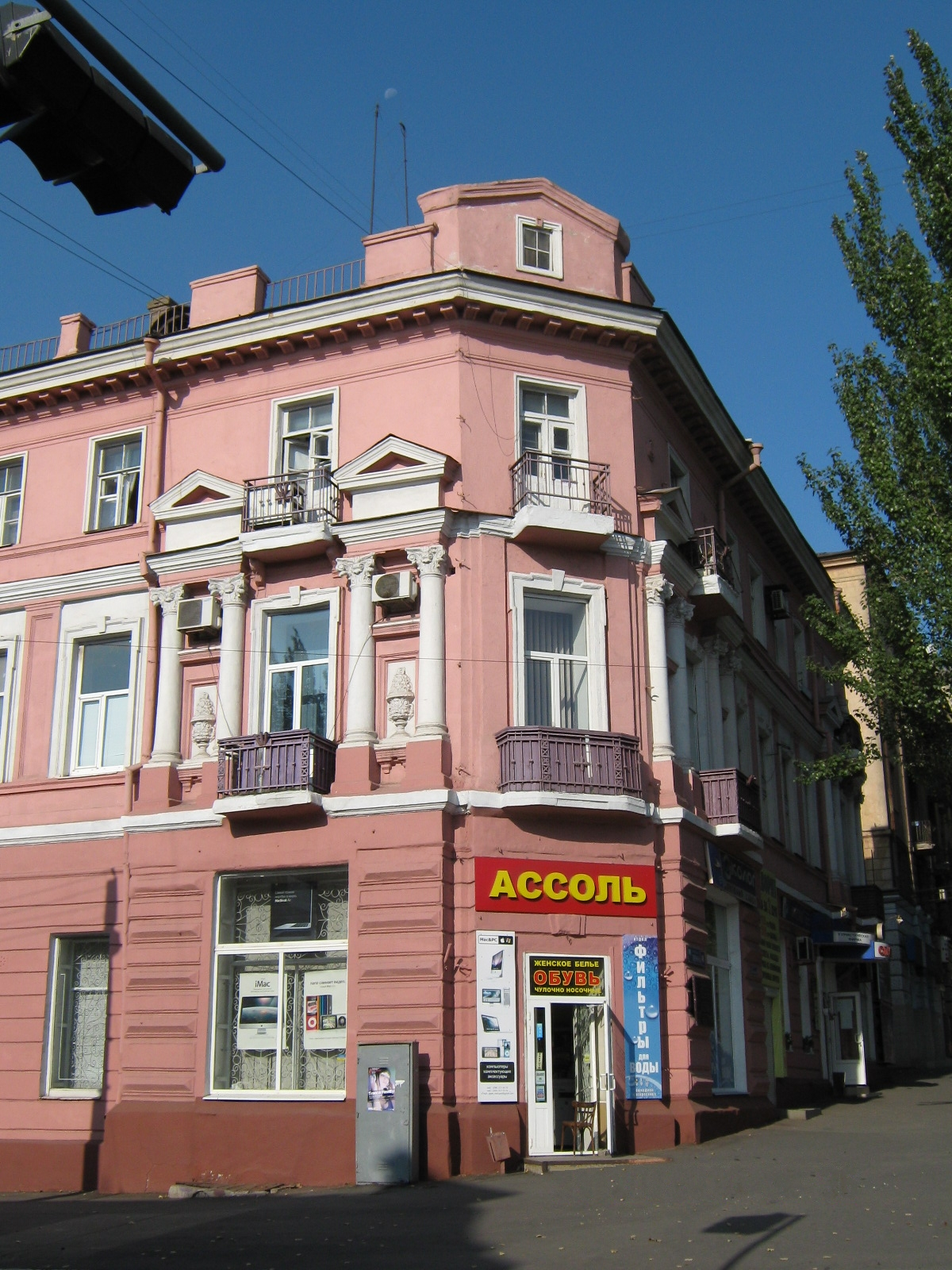 Будинок Юр'єва в Маріуполі